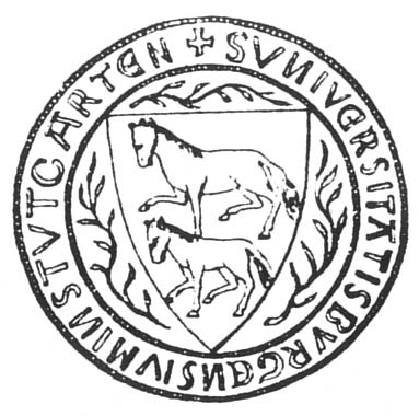 early seal of Stuttgart, S[igillum] Universitatis Burgensium in Stutgarten "seal of the community of burgers in Stuttgart" This is the seal of Stuttgart on the treaty with Esslingen of 1312. Volker Steck, Das Siegelwesen der südwestdeutschen Reichsstädte im Mittelalter, Esslinger Studien 12 (1994), p. 21. Zeitschrift für Württembergische Landesgeschichte 64 (2005), p. 20.